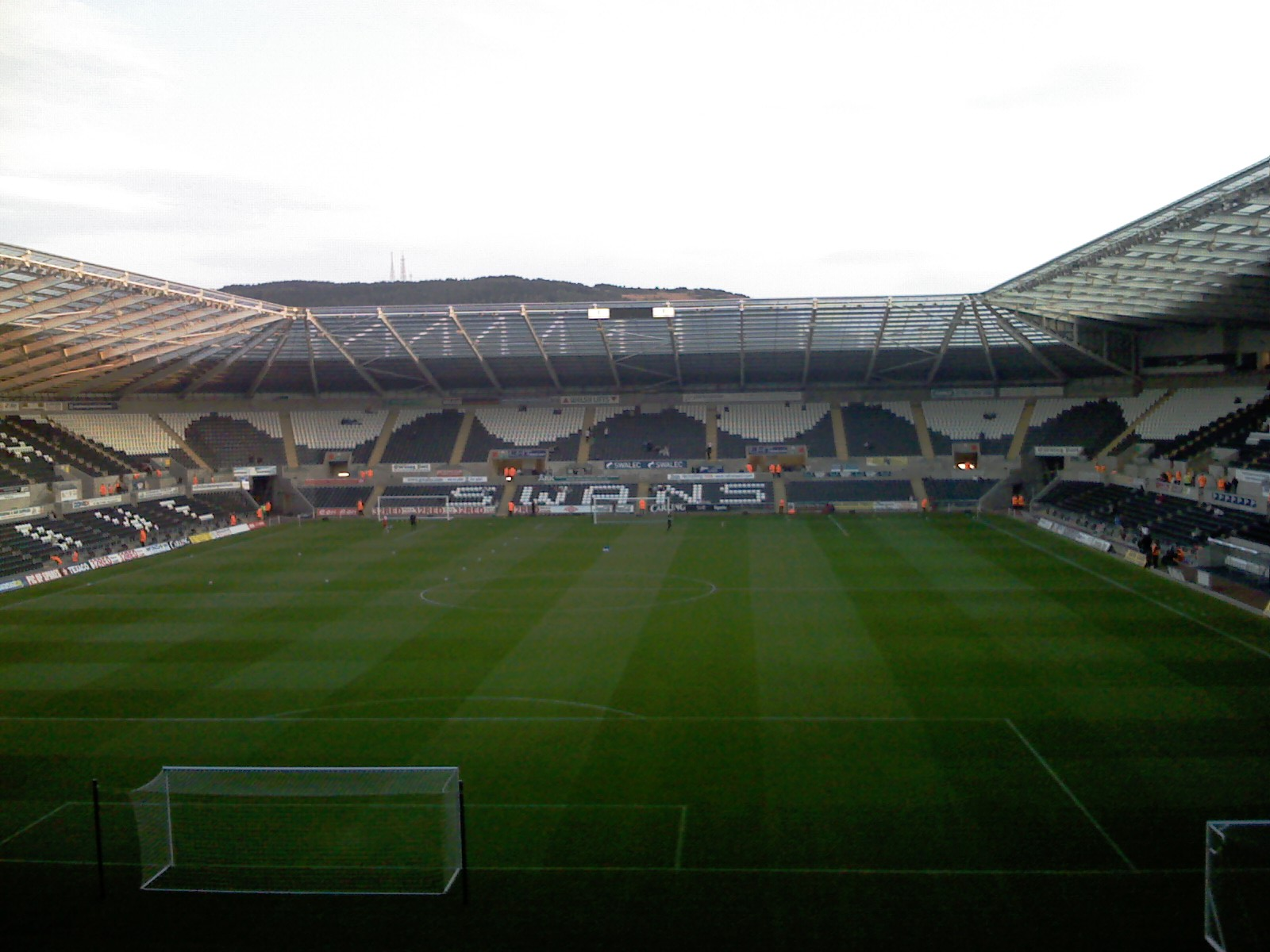 IMAGE_152